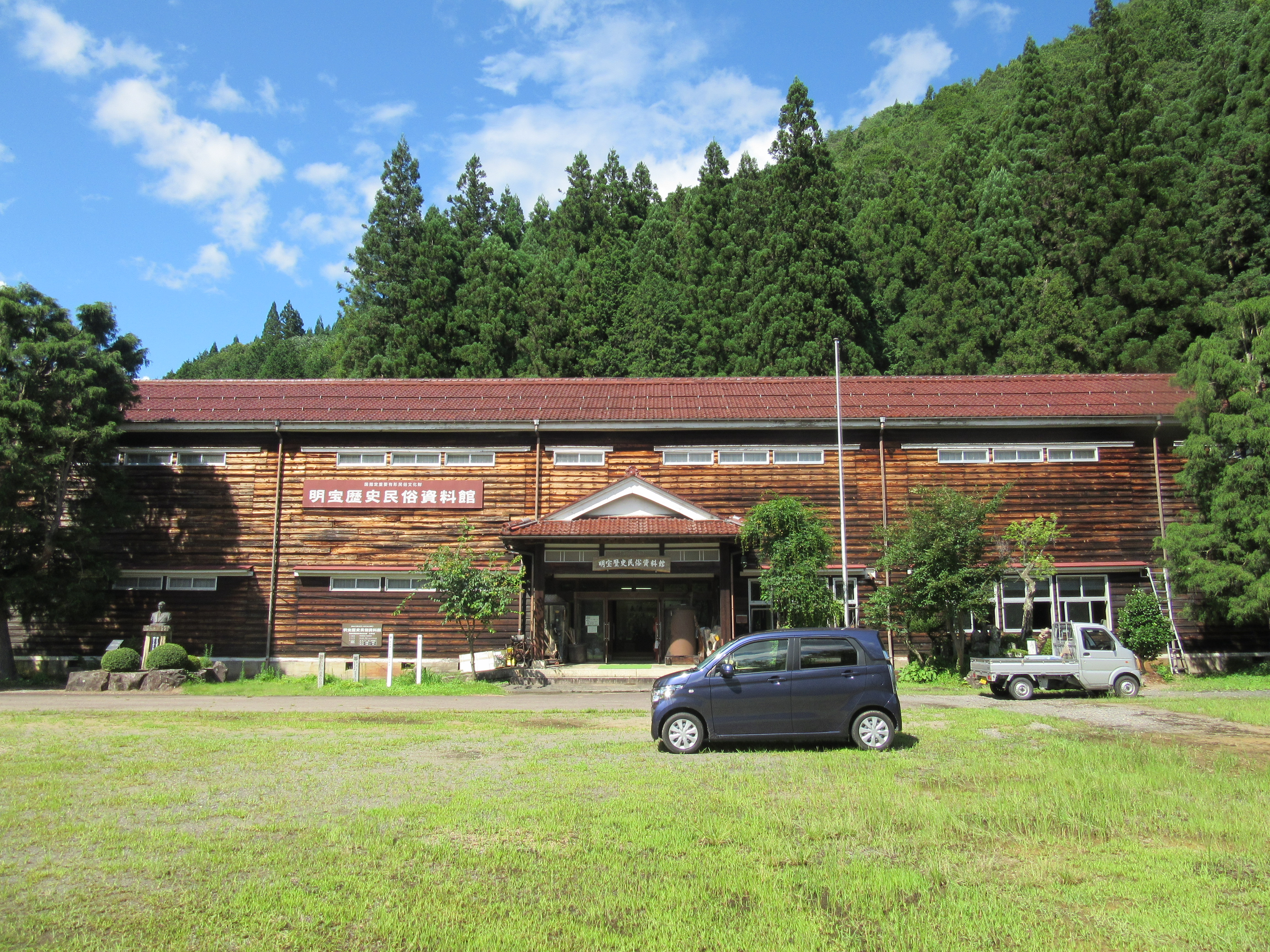 明宝歴史民俗資料館